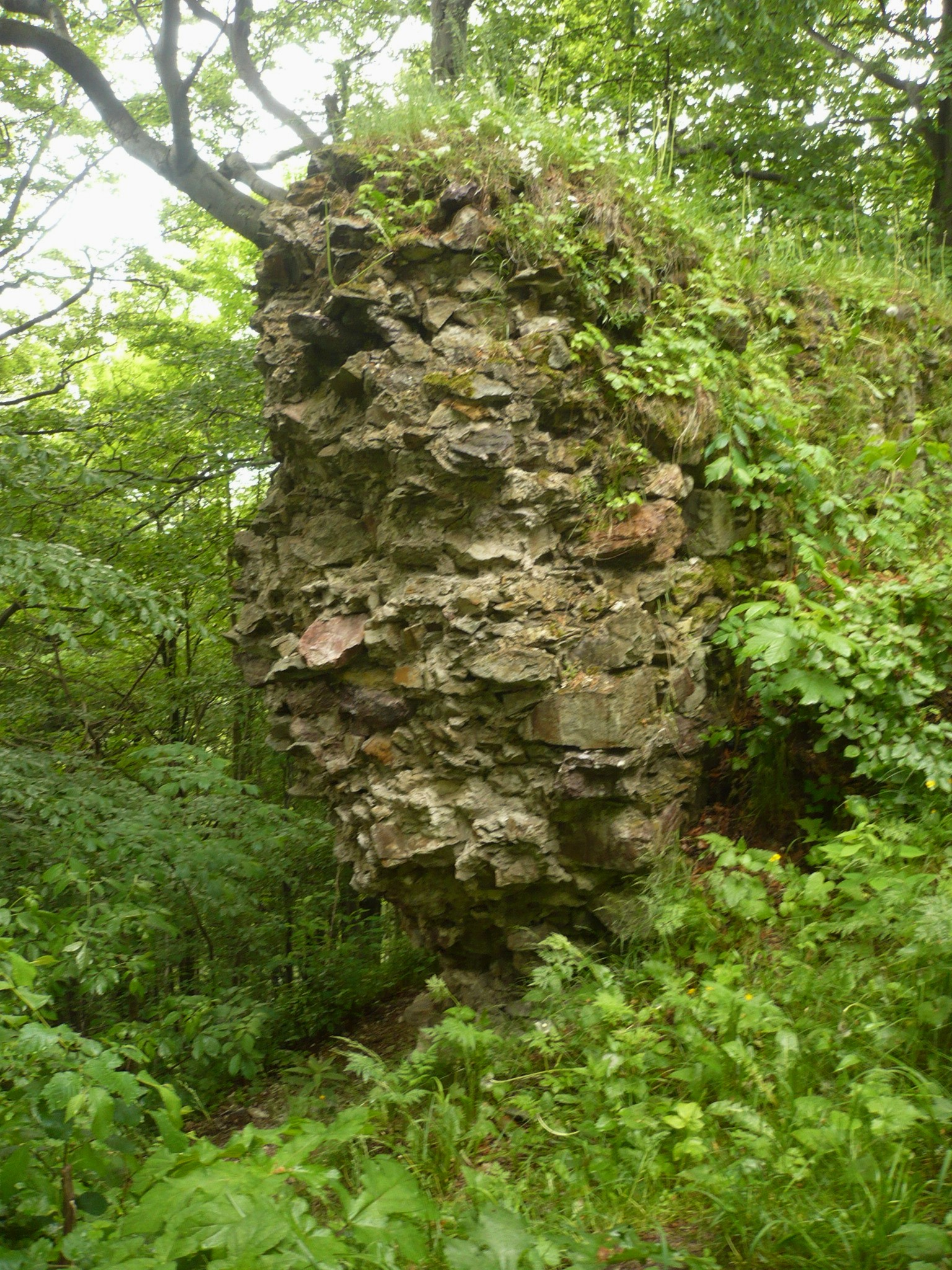 Zamek Homole